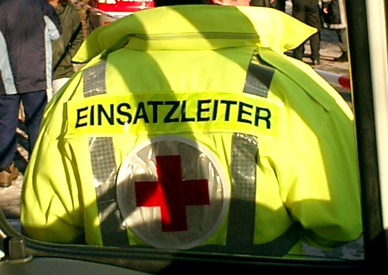 Einsatzleiter des Rotens Kreuzes Österreich